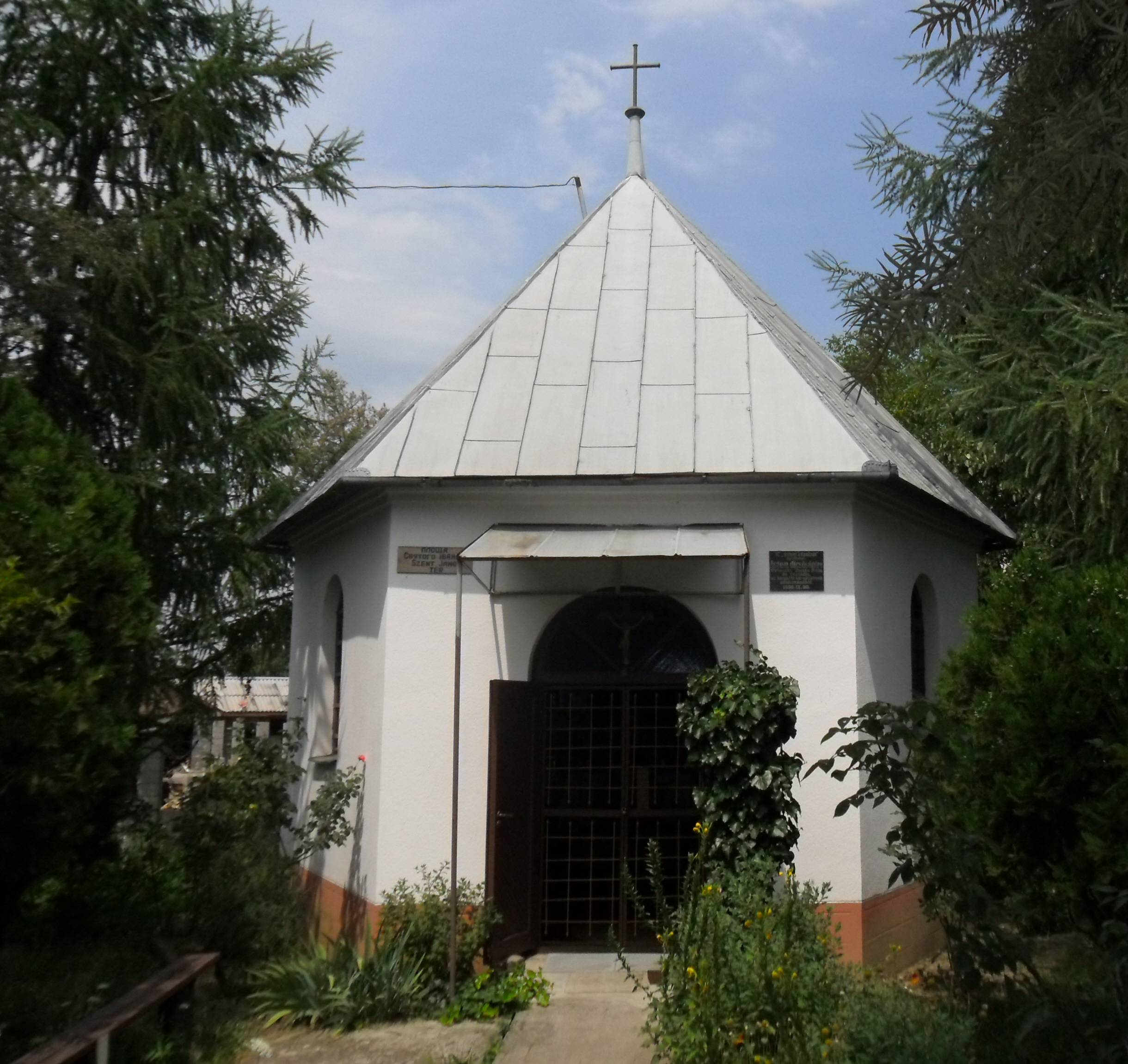 Római katolikus kápolna Tiszaújlakon (Kárpátalja, Ukrajna)